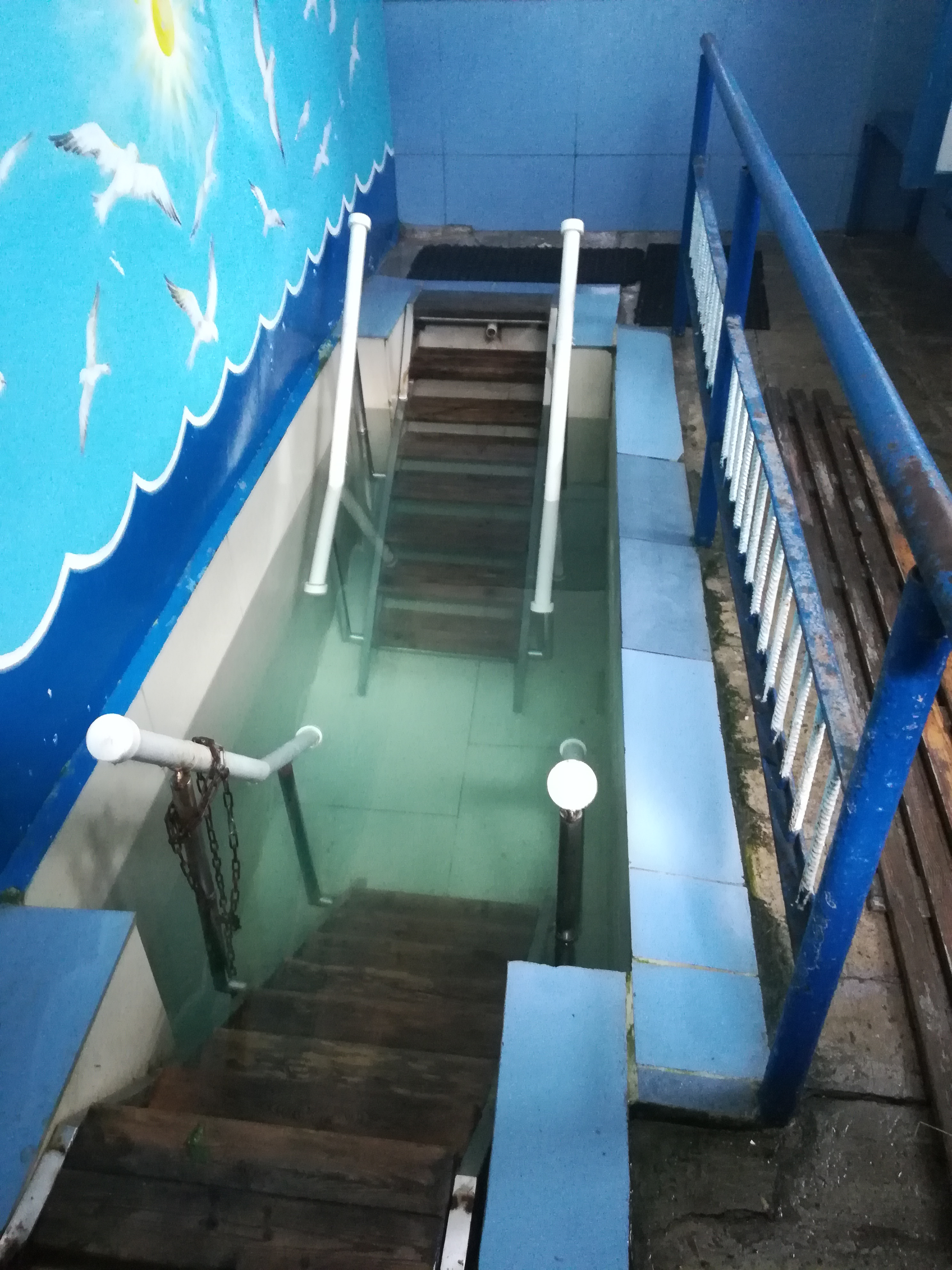 Боголюбово